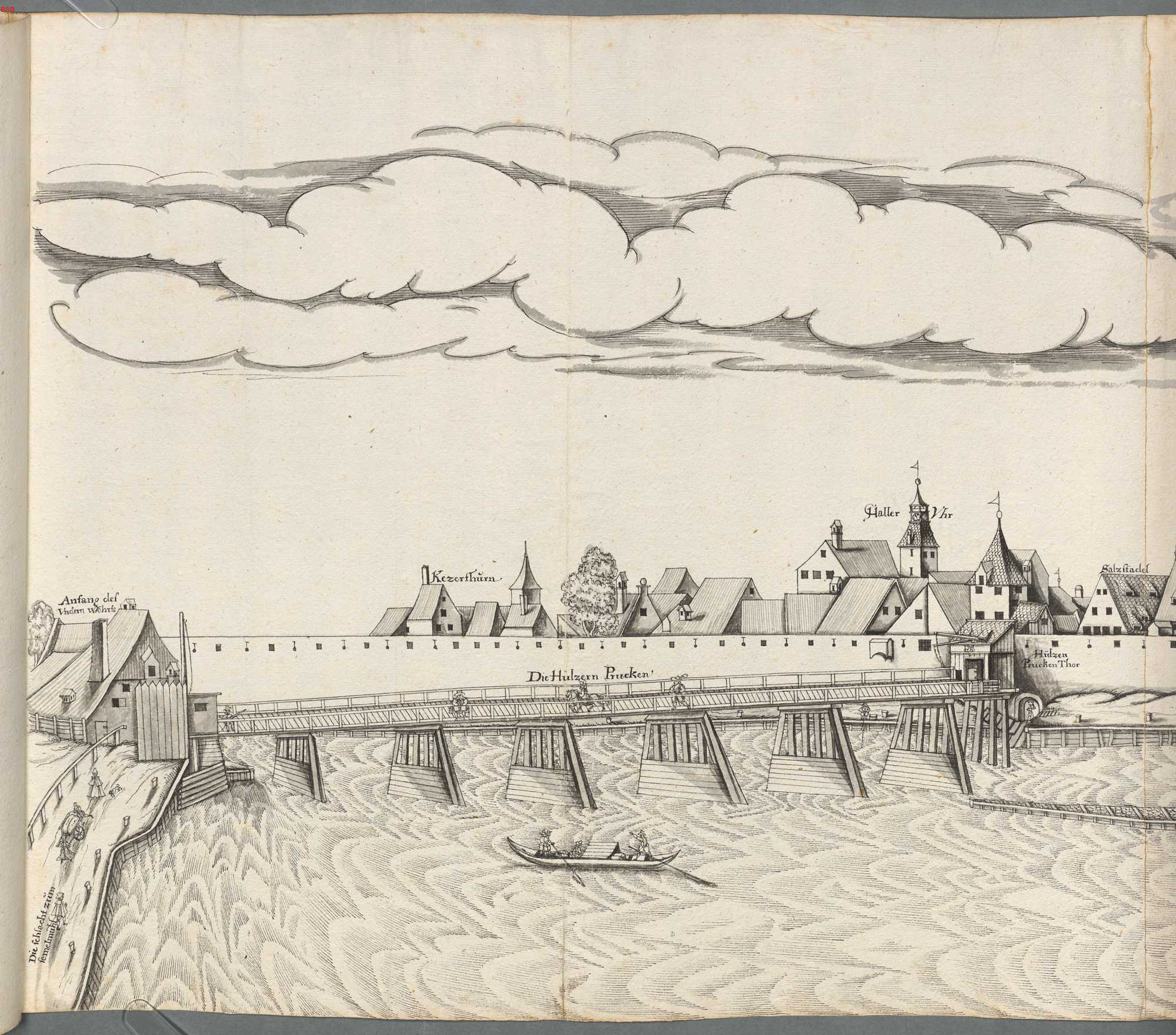 Abriß der Stadt Regensburg östlich und westlich der Steinernen Brücke. Beschriftung: Anfang des Vndern Wöhrd, (Anfang Unterer Wöhrd), Die Hülzern Prucken (Hölzerne Brücke vom Donau-Ufer zum Unteren Wöhrd), Kezerturm (Ketzerturm, Gichtlgasse, Abbruch 1864), Hülzern Prücken Thor, Salzstadel ( ? ), Haller Uhr (Haller-Tor mit Uhr, Abbruch 1868)